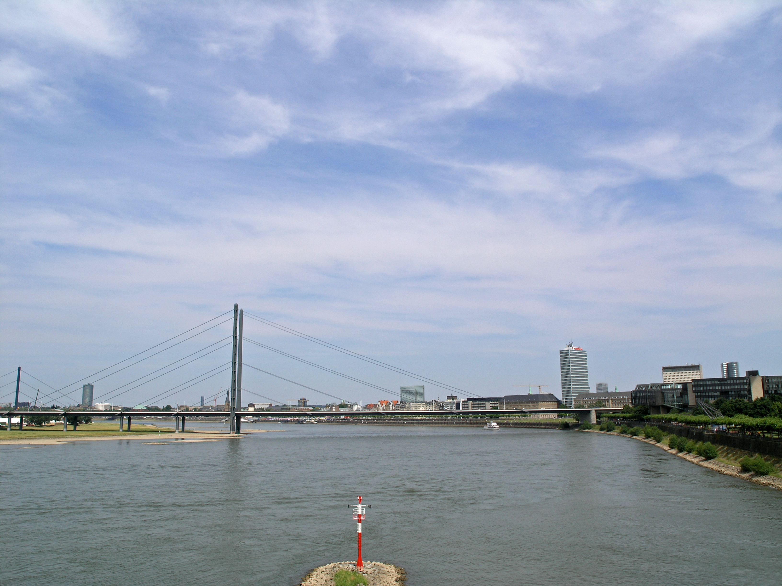 Северный Рейн-Вестфалия, Дюссельдорф - мост Rheinkniebrücke